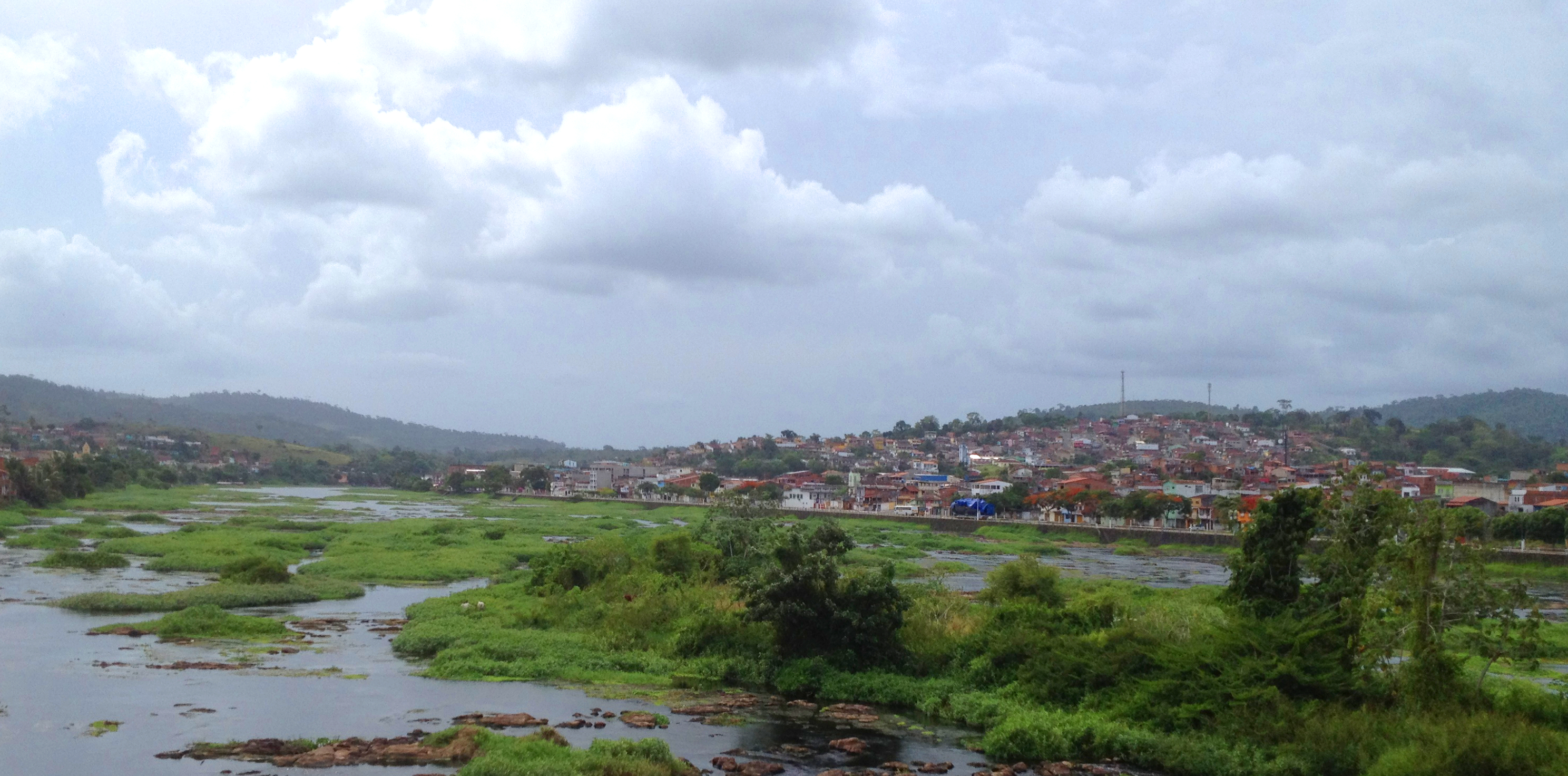 Ubaitaba Vista da Ponte Sobre o Rio de Contas na BR-101. Ubaitaba View from the Bridge Over Rio de Contas river on BR-101 highway.